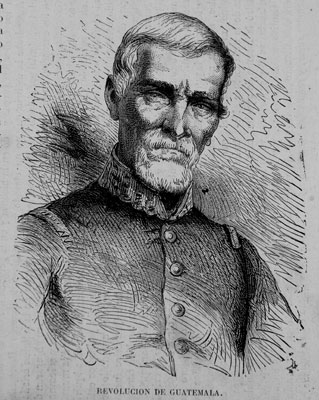 Antonio Solares, military guatemalteco que comandaba las tropas que asesinaron al mariscal Serapio Cruz.1